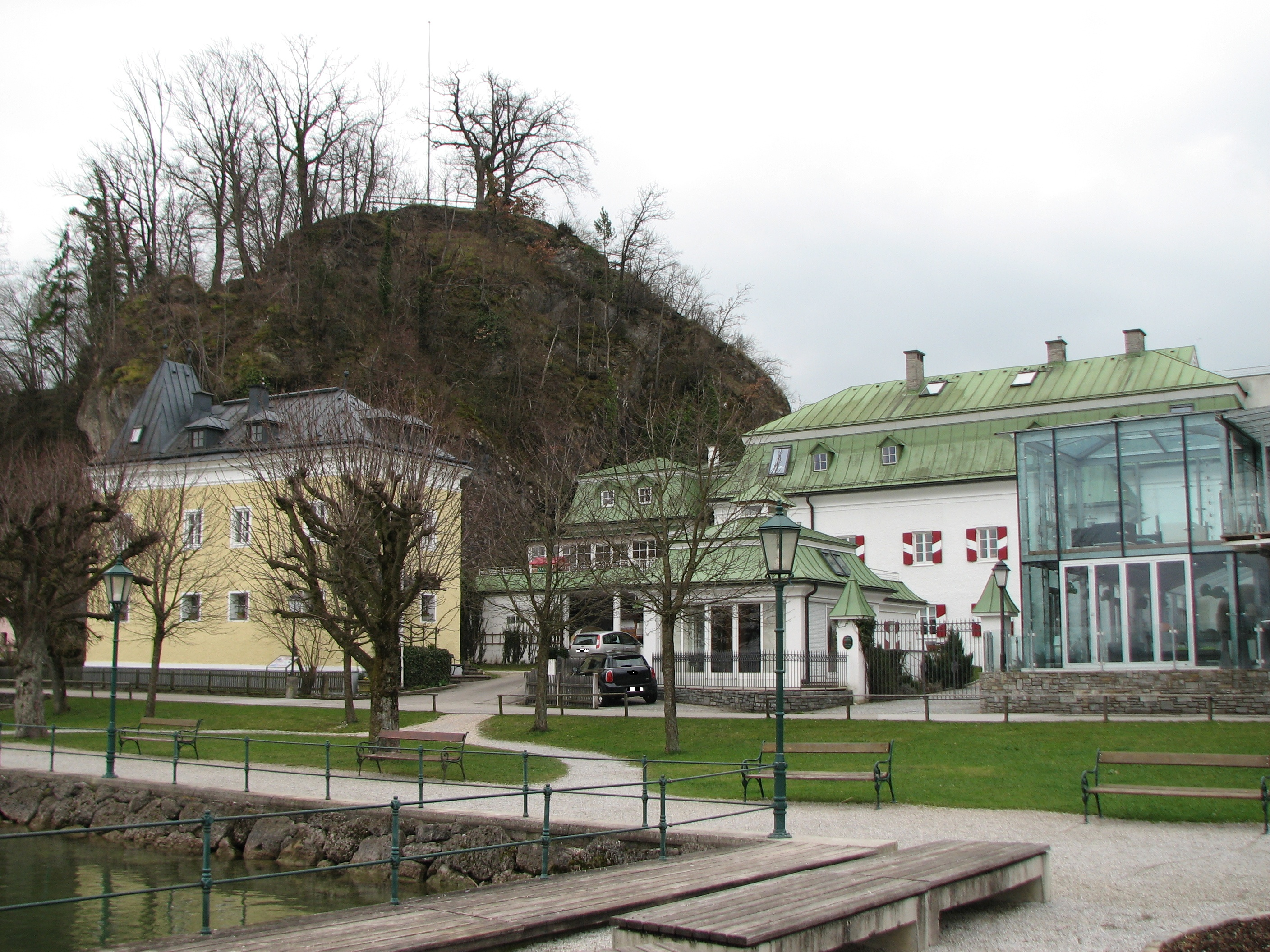 Ehem. Pfleggericht